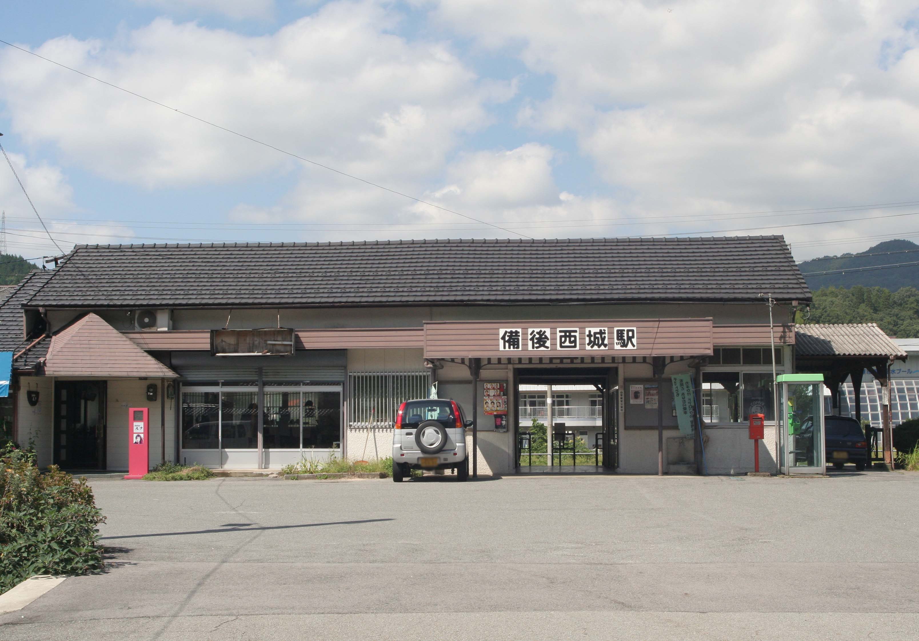 備後西城駅の駅舎